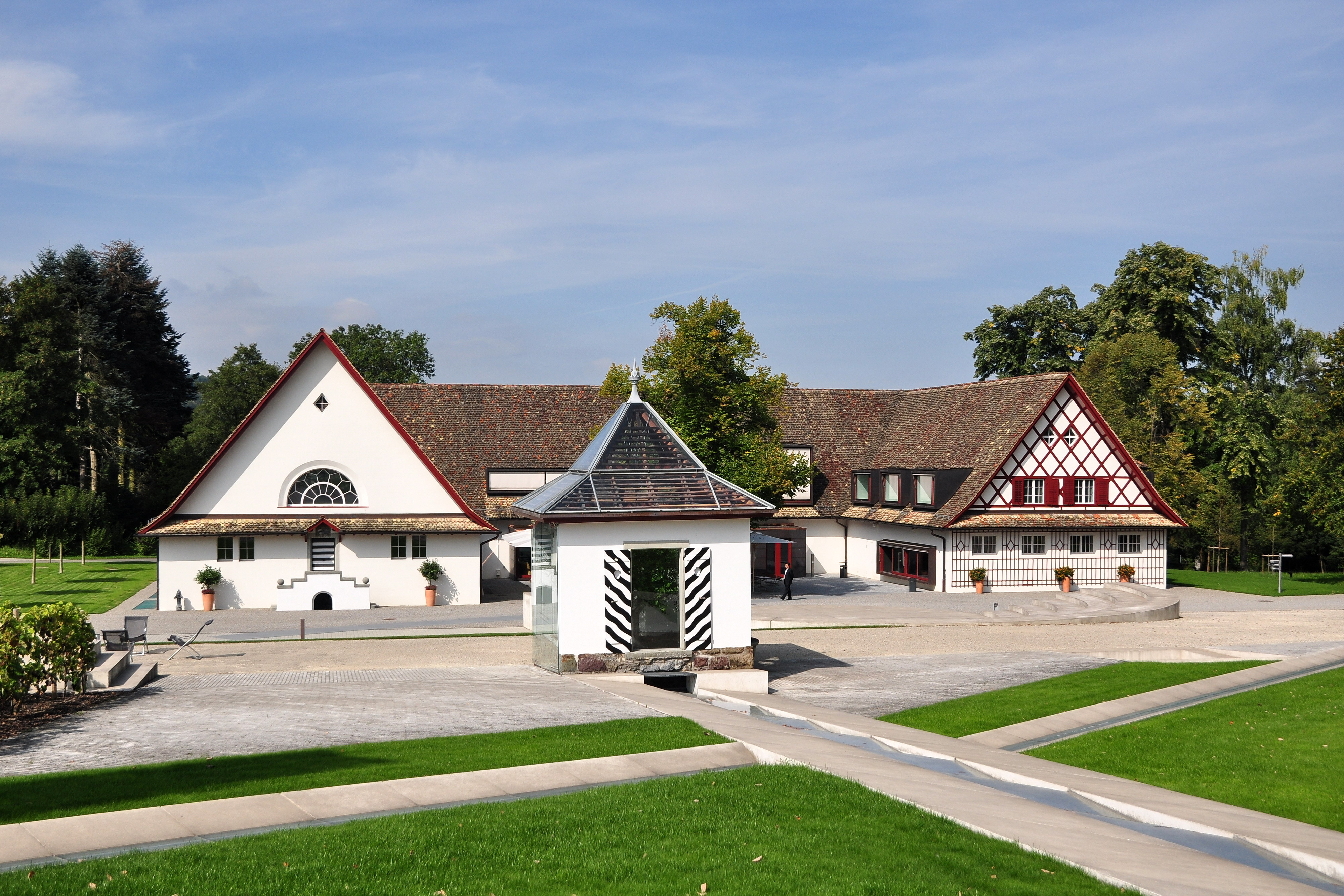 Landgut Bocken in Horgen (Switzerland)